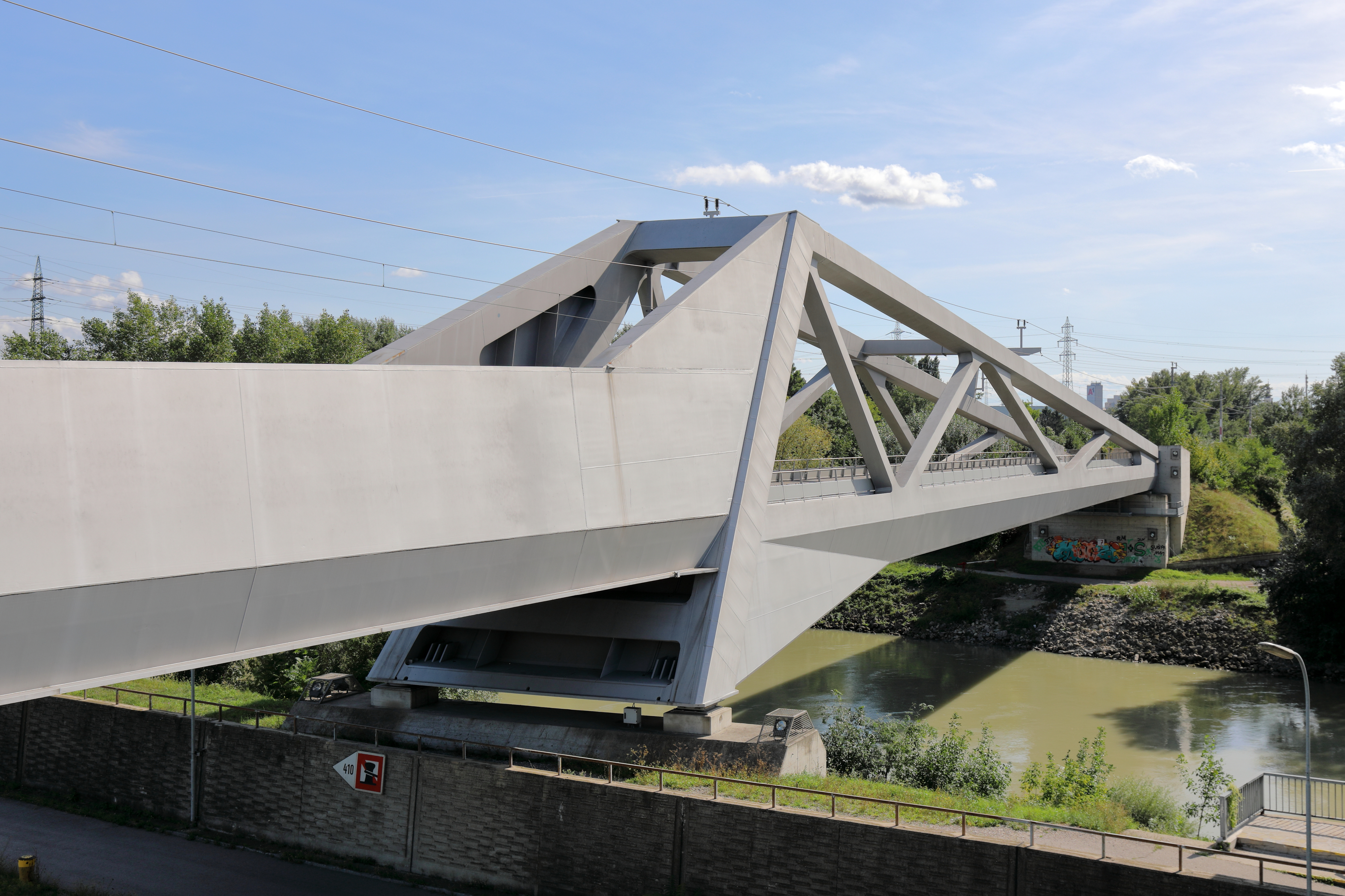 Der südliche Teil bzw. die Donaukanal-Querung der eingleisigen Winterhafenbrücke nächst dem Hafen Freudenau (ehemals als Winterhafen bezeichnet) im 2. Wiener Gemeindebezirk Leopoldstadt.Die ursprüngliche Eisenbahnbrücke wurde Ende des II. Weltkrieges gesprengt und nicht mehr aufgebaut. Nach dem Bau eines Containerterminals neben dem Hafen, wurde die Verbindung zwischen der Donauuferbahn und der Donauländebahn wieder hergestellt und dazu die Brücke als das zentrale Bindeglied errichtet. Der Spatenstich für die 172 m lange Brücke erfolgte am 13. Februar 2007 und wurde nach einem Entwurf des Architekten Albert Wimmer gebaut. Sie ist eine asymmetrische Stahlbrücke, die mit dynamischer Linienführung aus einem Fachwerk über den Donaukanal und einer Trogbrücke über die Hafen-Einfahrt besteht.